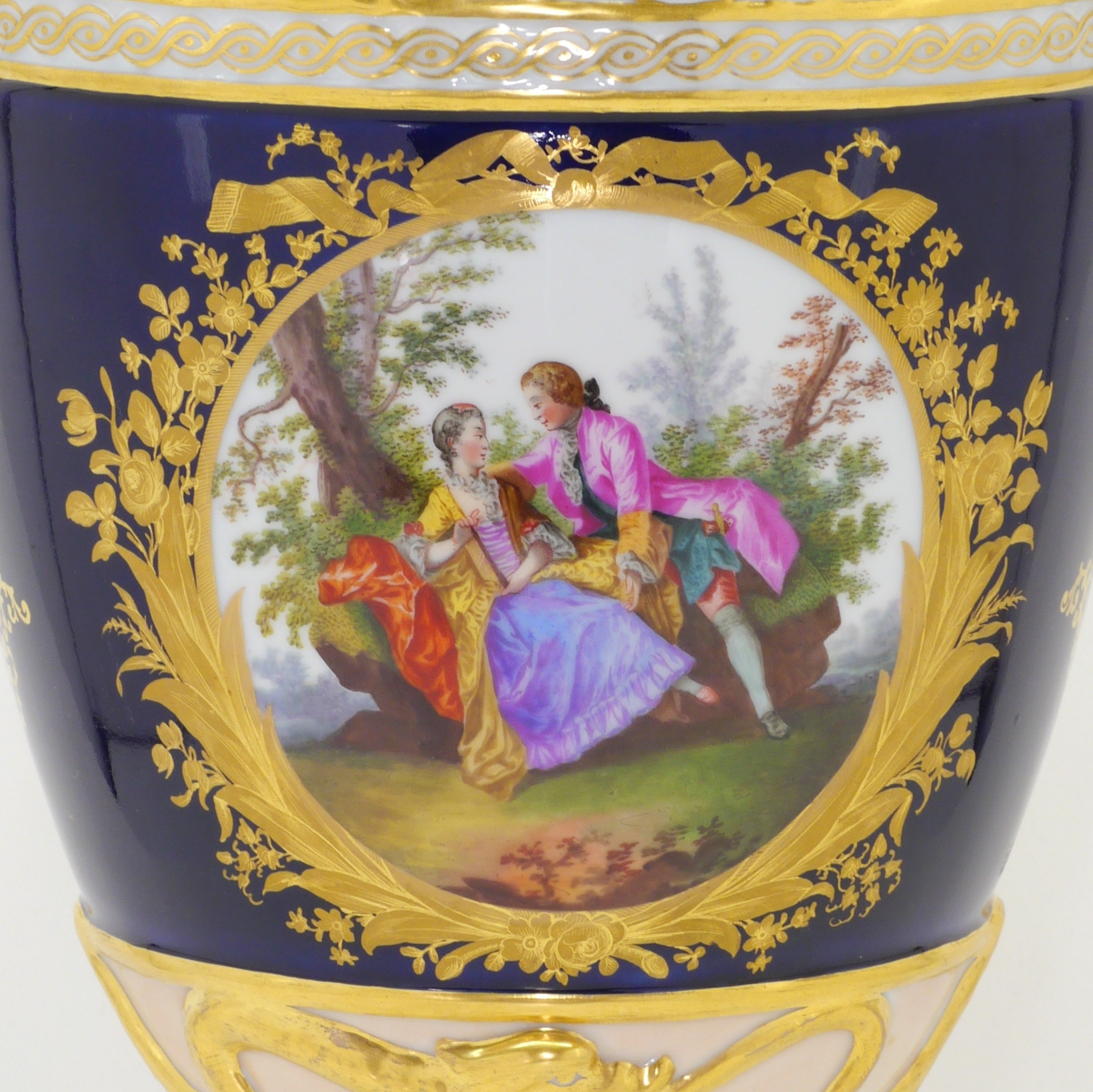 Watteau-Szene on a Vase KPM Berlin, um 1830